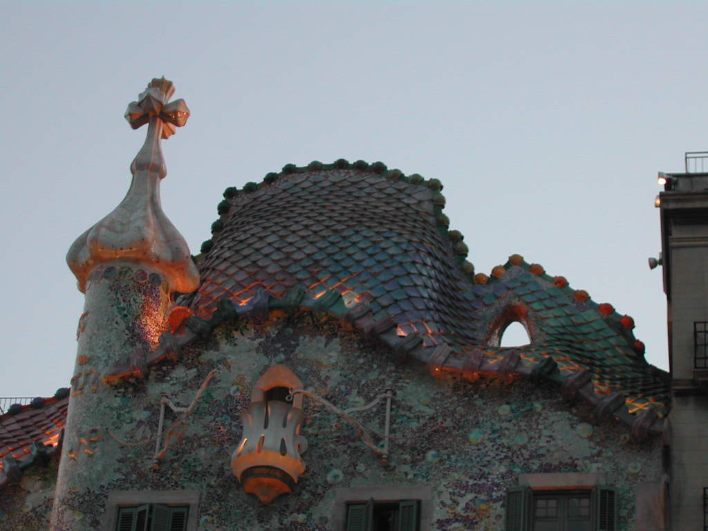 Barcelona, Casa Battló, sera